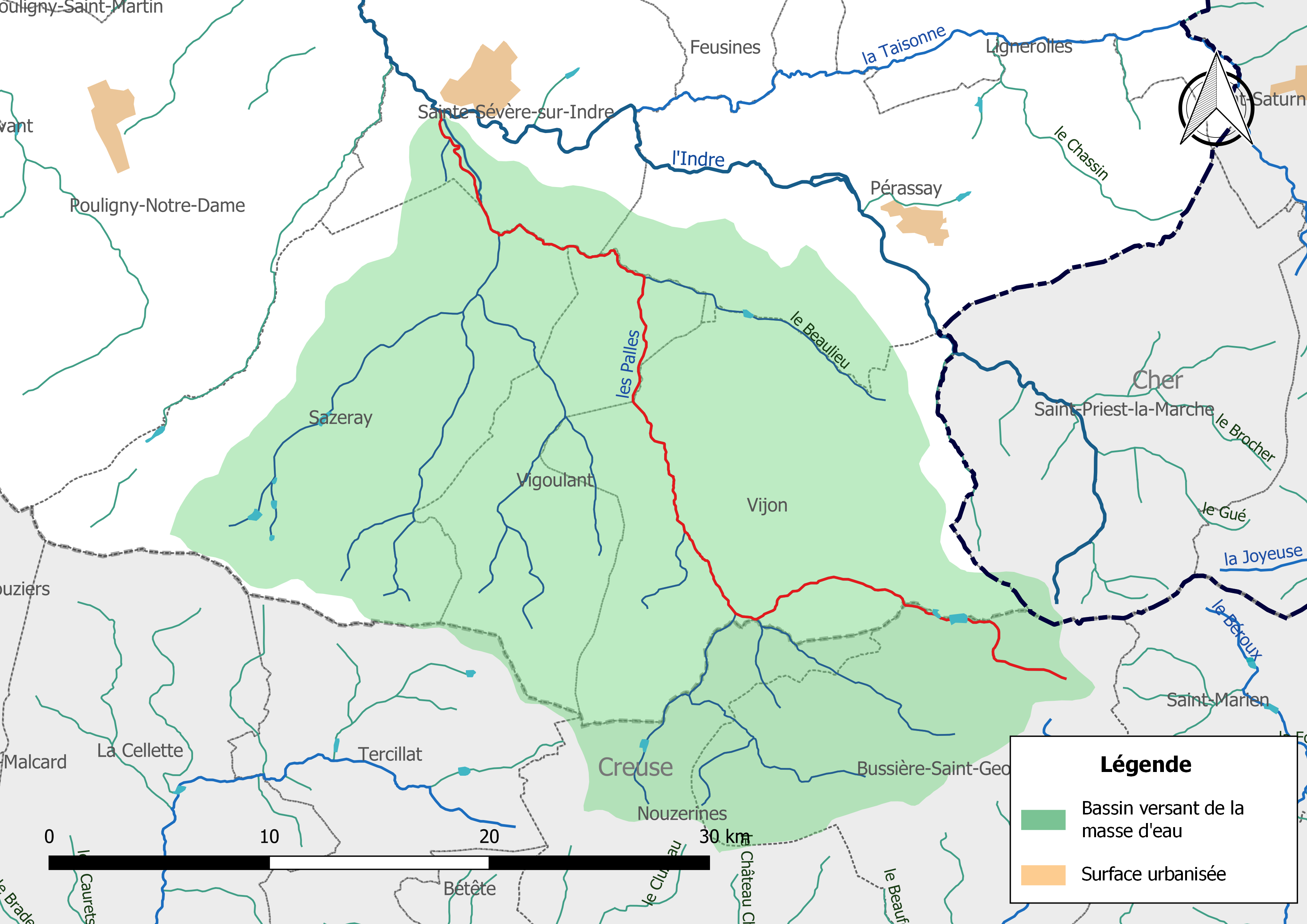 Carte de la masse d'eau « FRGR1852 », avec mise en exergue du cours d'eau « Les Palles » (en rouge).